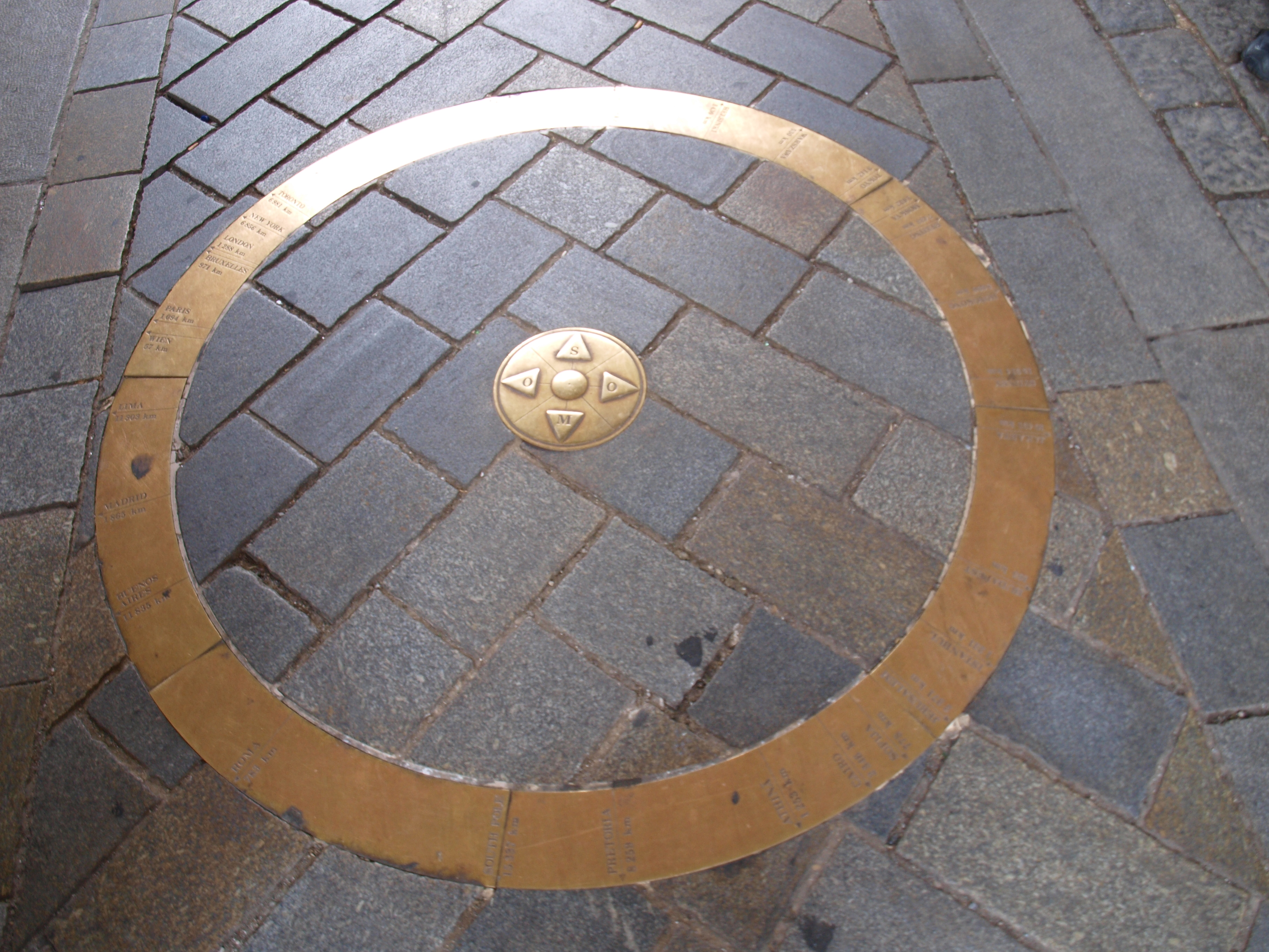 Kilometer Zero, Bratislava